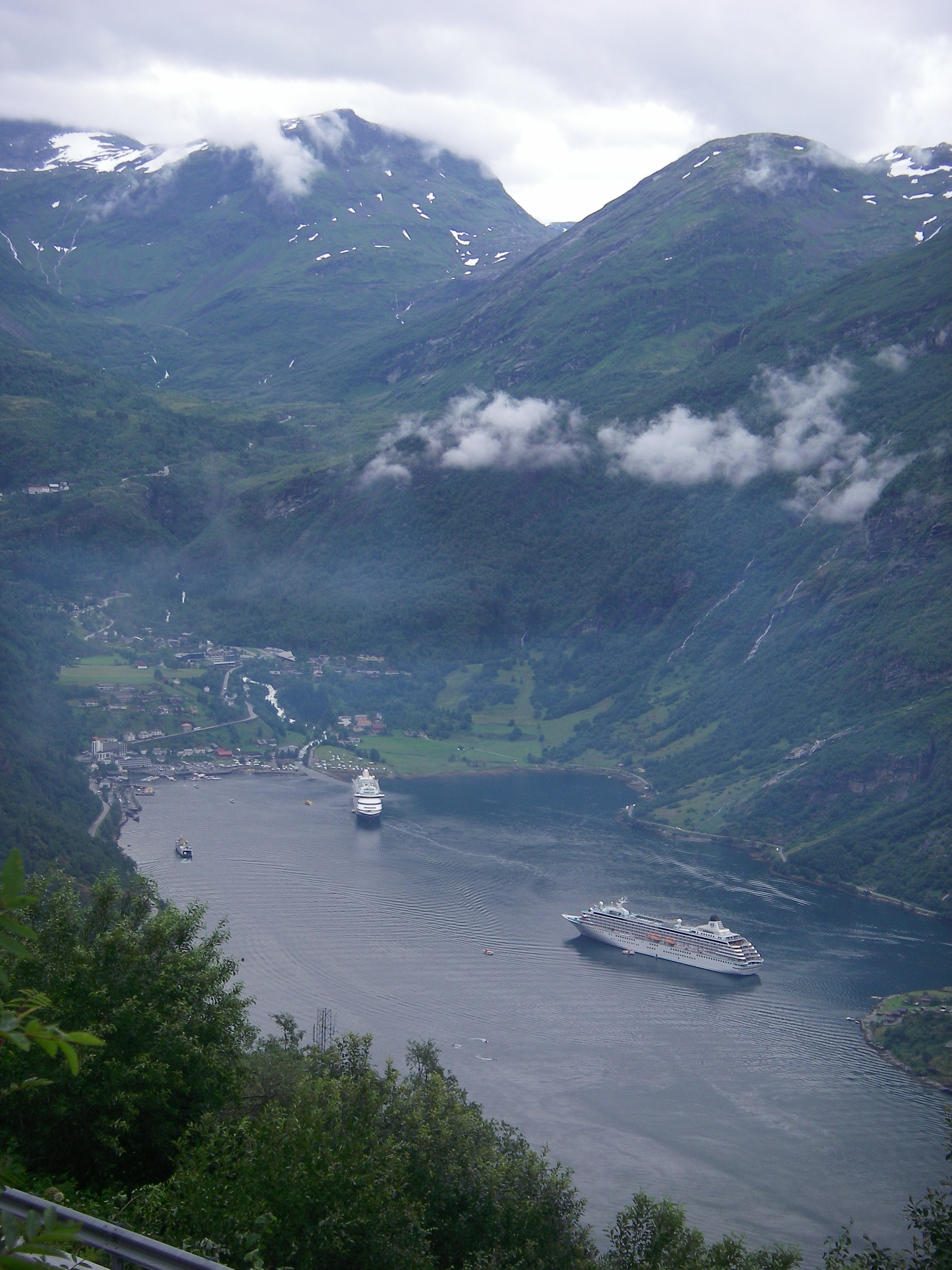 Utsikt over Geirangerfjorden